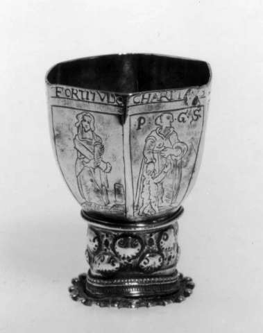 Rømer i sølv med innskrift: 'FIDES/SPES7FORTITVDO7CHARITA../IVSTITIA/PRVDENCIA' og merket: 'PGS'. Innkommet fra Luster i Sogn og Fjordane. Høyde 6,3 cm. Norsk Folkemuseum NF.1915-1733. Foto: Anne-Lise Reinsfelt.